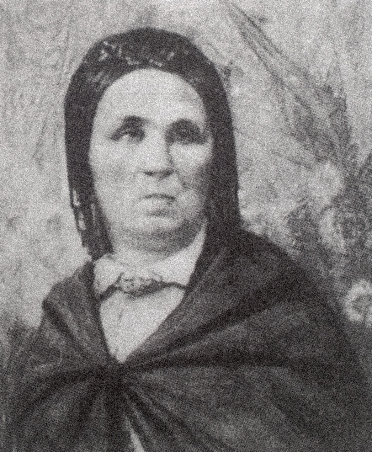 Madame Milhet vers 1850/1860. Une habitante de Lourdes, celle chez qui Bernadette Soubirous a logé du 18 au 21 février 1858, au cours de la période à laquelle ont eu lieu les apparitions.